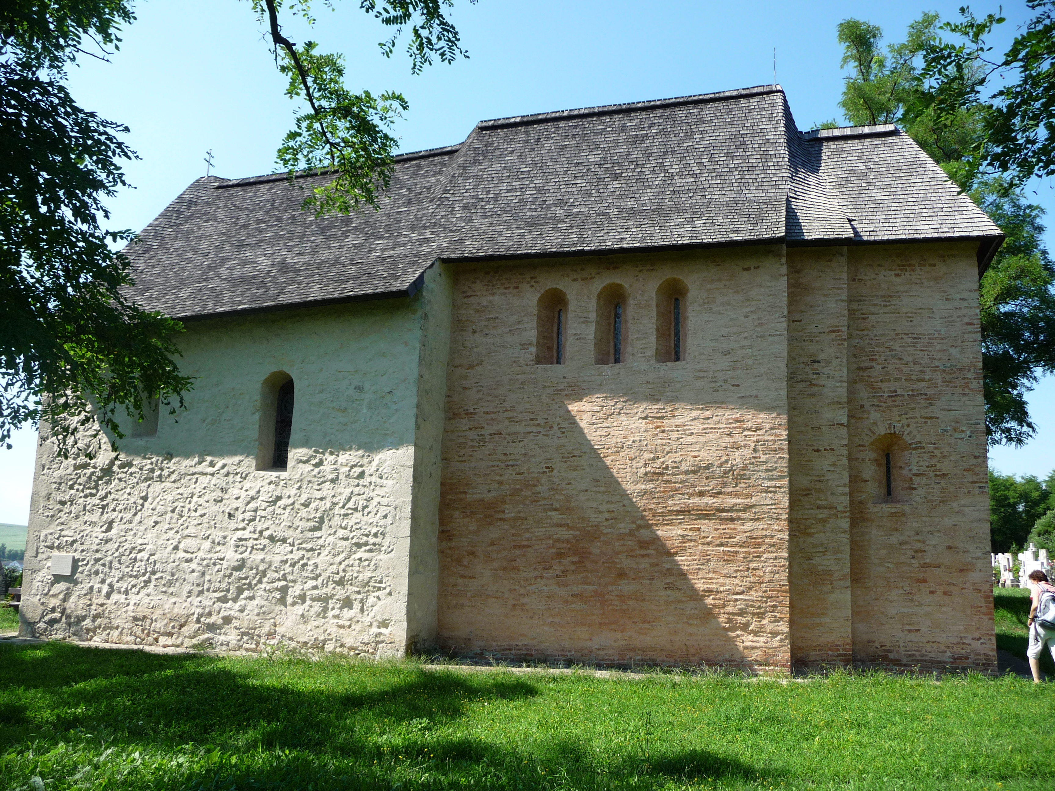 A templom déli fala (Egyházasdengeleg, Szent Imre-templom) This is a photo of a monument in Hungary, Identifier: 6578